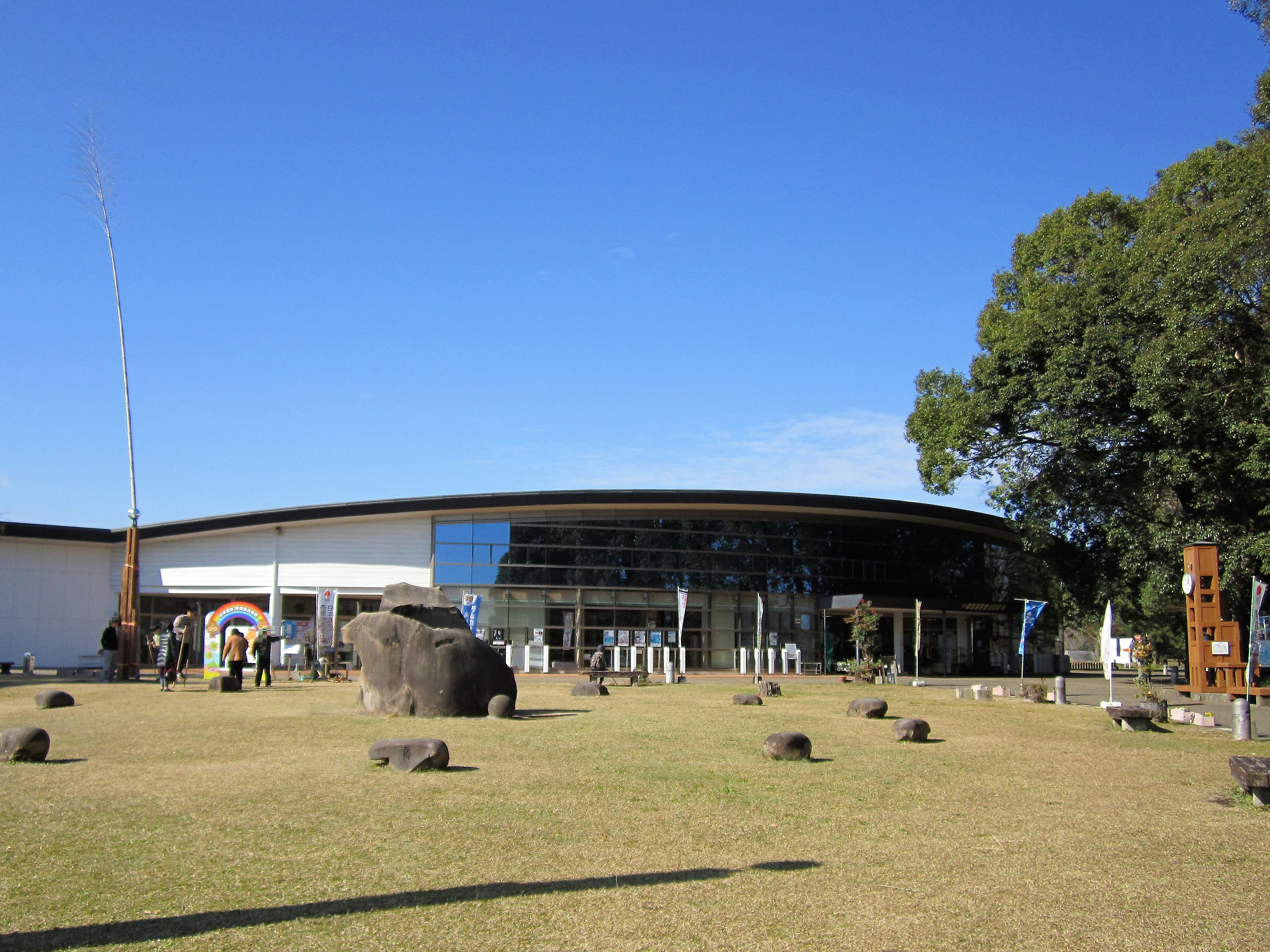 西都原ガイダンスセンター このはな館 Canon PowerShot A2200